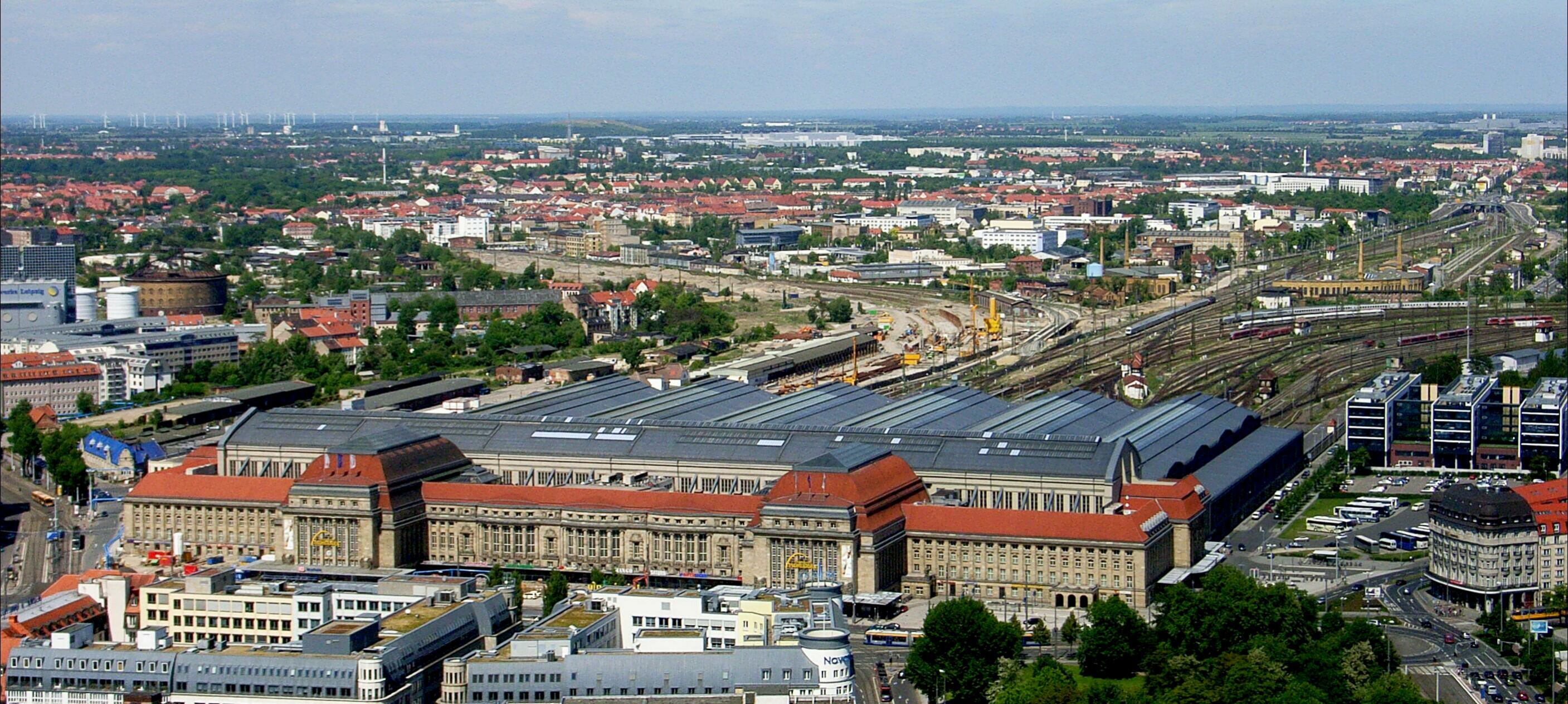 Dieses Bild zeigt den Leipzig Hauptbahnhof.